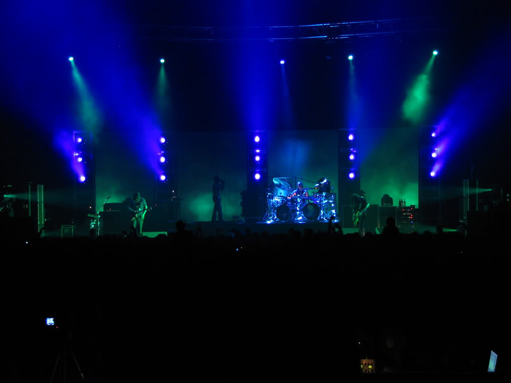 Tool performing live in 2006.